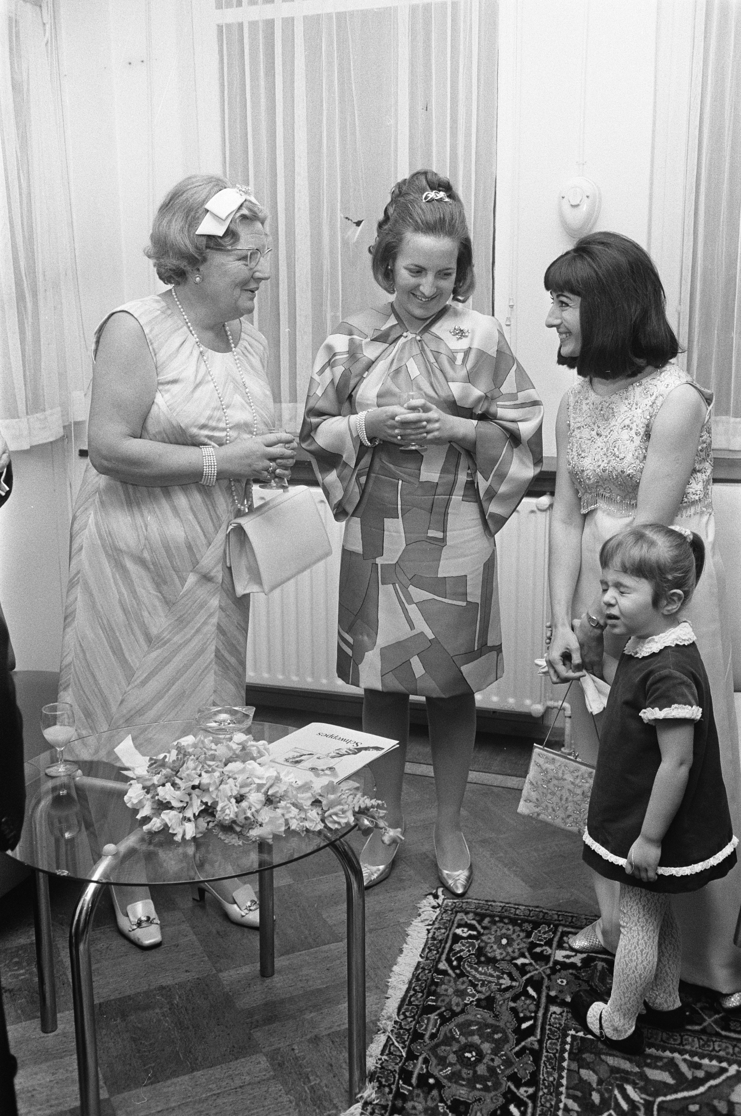 Koningin Juliana en prinses Margriet met de Belgische harpiste Susanne Mildonian en haar 3-jarig dochtertje. Holland Festival, Amsterdam, 8 juli 1969